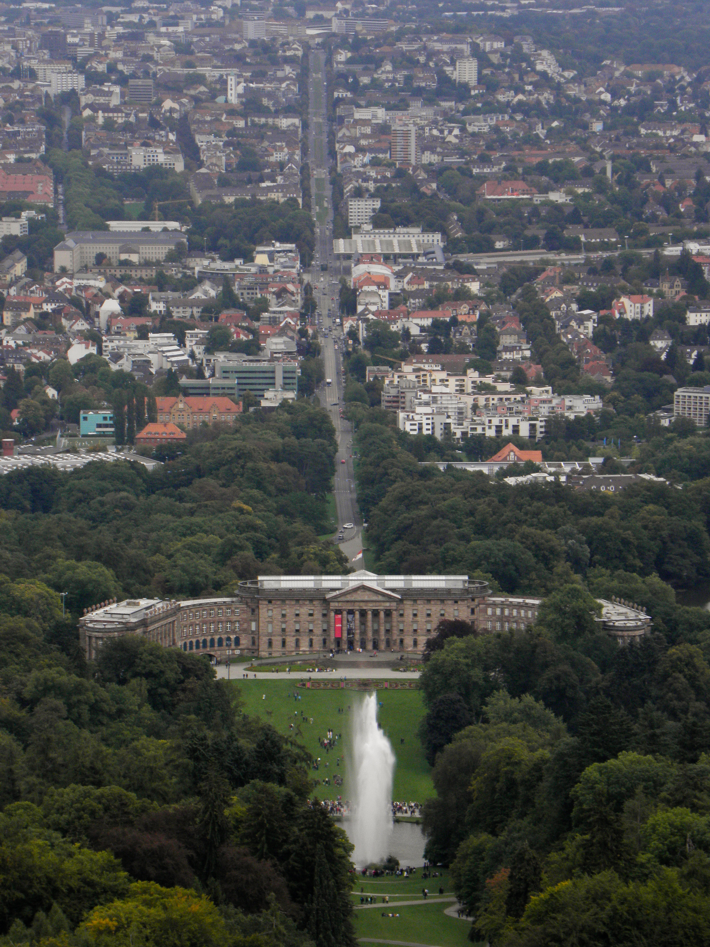 Wilhelmshöher Alle in Kassel. Im Vordergrund das Schloss Wilhelmshöhe und die grosse Fontäne der Wasserspiele im Bergpark.